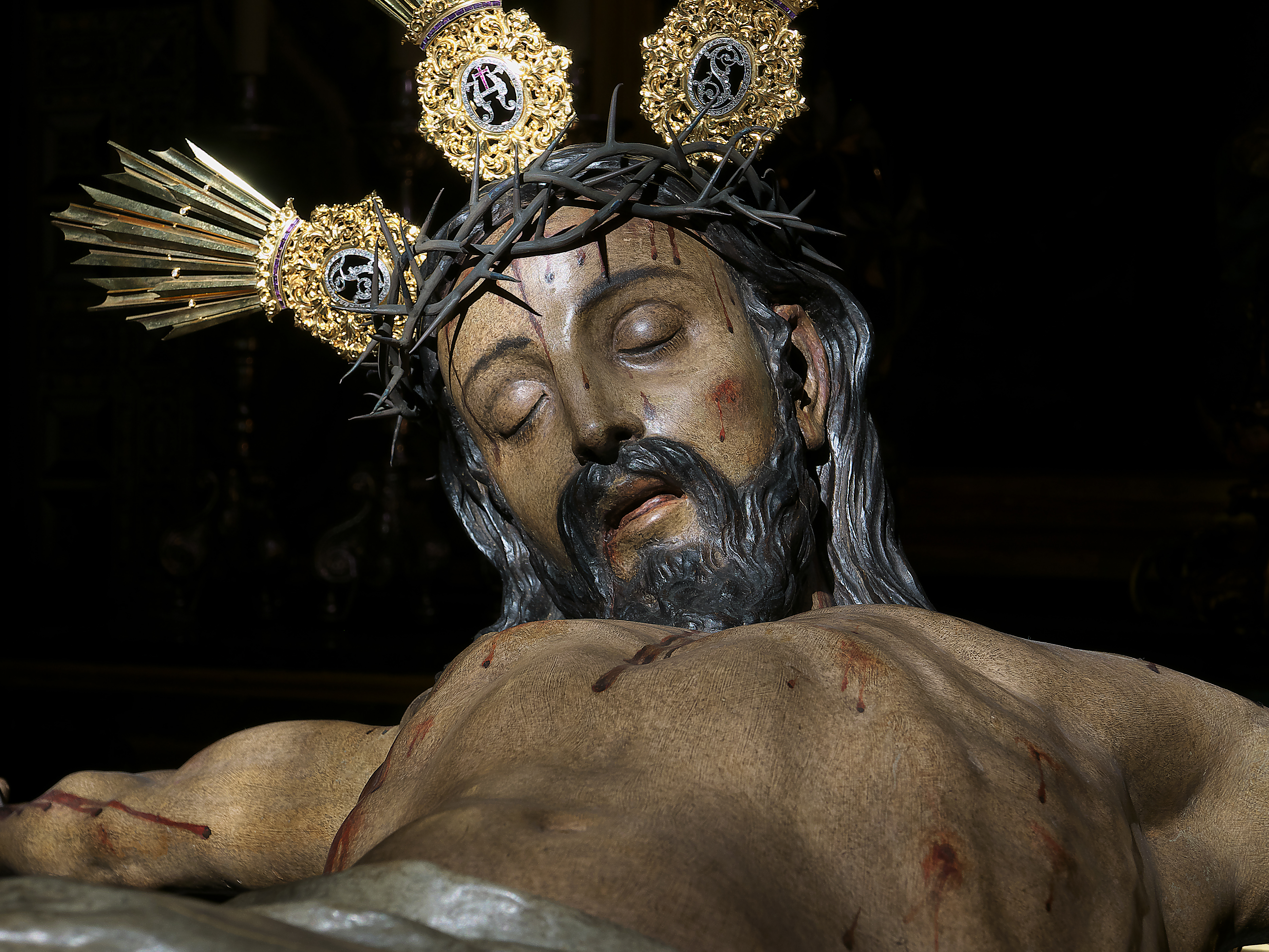 Iglesia de San Pedro (Sevilla). Imagen titular de la Pontificia, Real, Ilustre y Fervorosa Hermandad y Cofradía de Nazarenos del Santísimo Cristo de Burgos, Negaciones y Lágrimas de San Pedro y Madre de Dios de la Palma. Sevilla. Juan Bautista Vázquez, el Viejo (1573)